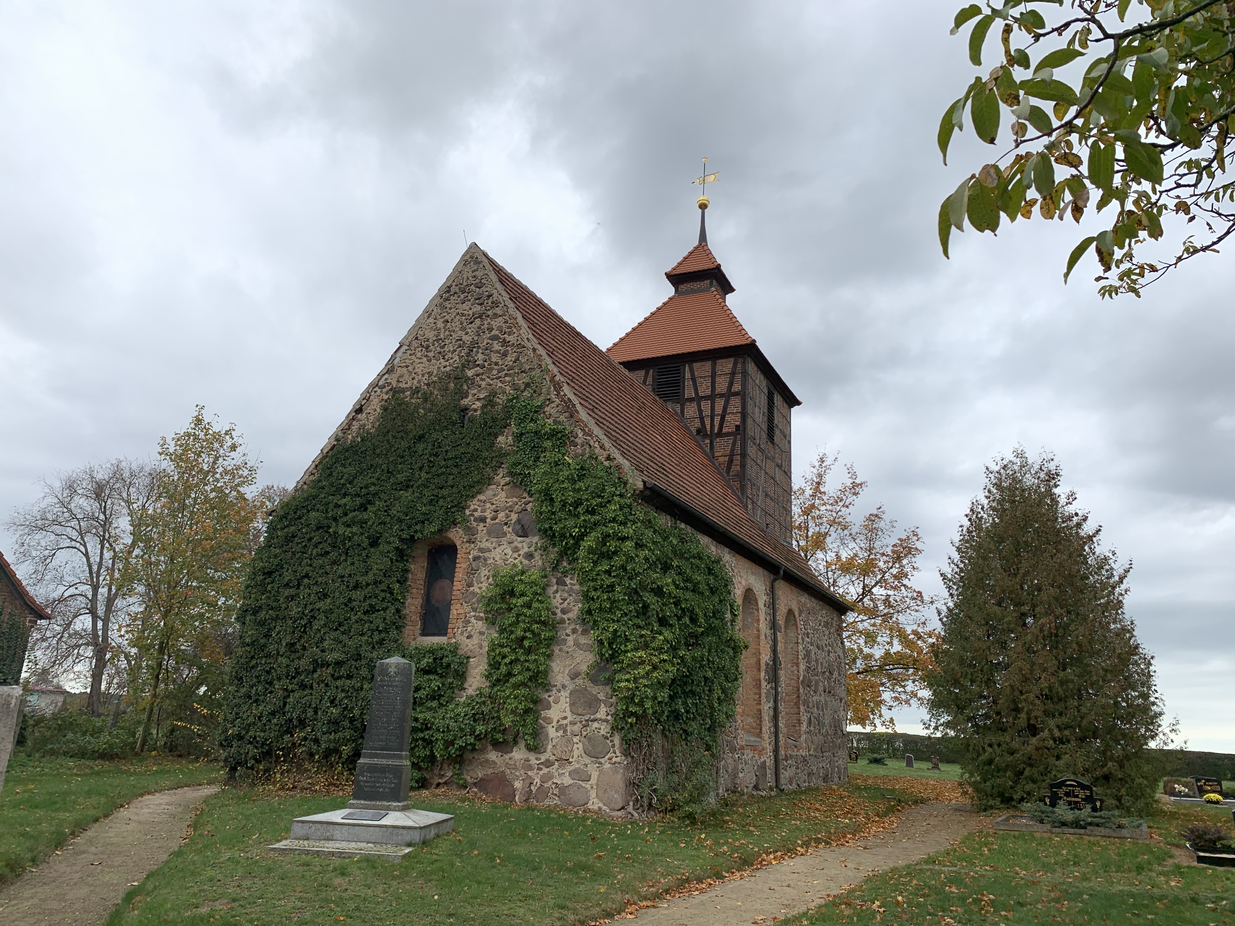 Die Dorfkirche Niederseefeld in der Gemeinde Niederer Fläming im Landkreis Teltow-Fläming ist eine Saalkirche aus dem 15. Jahrhundert. Im Innern steht unter anderem ein Kanzelaltar aus dem Jahr 1883.